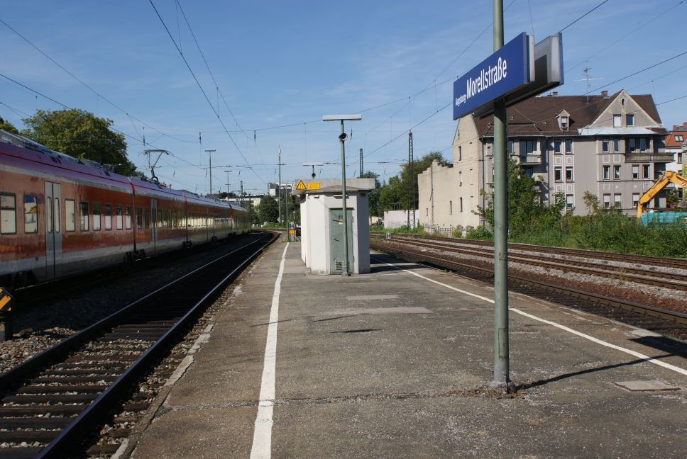 Bahnhof Augsburg-Morellstraße